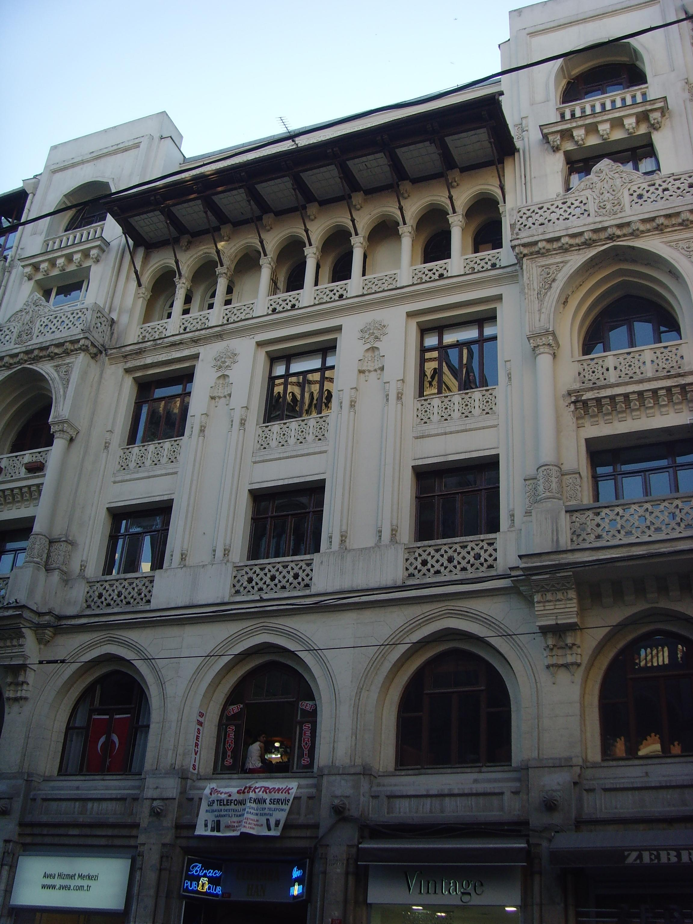 İstiklal Caddesi'ndeki Elhamra Sineması'nın da yer aldığı Elhamra Han / Elhamra Han on İstiklal Avenue